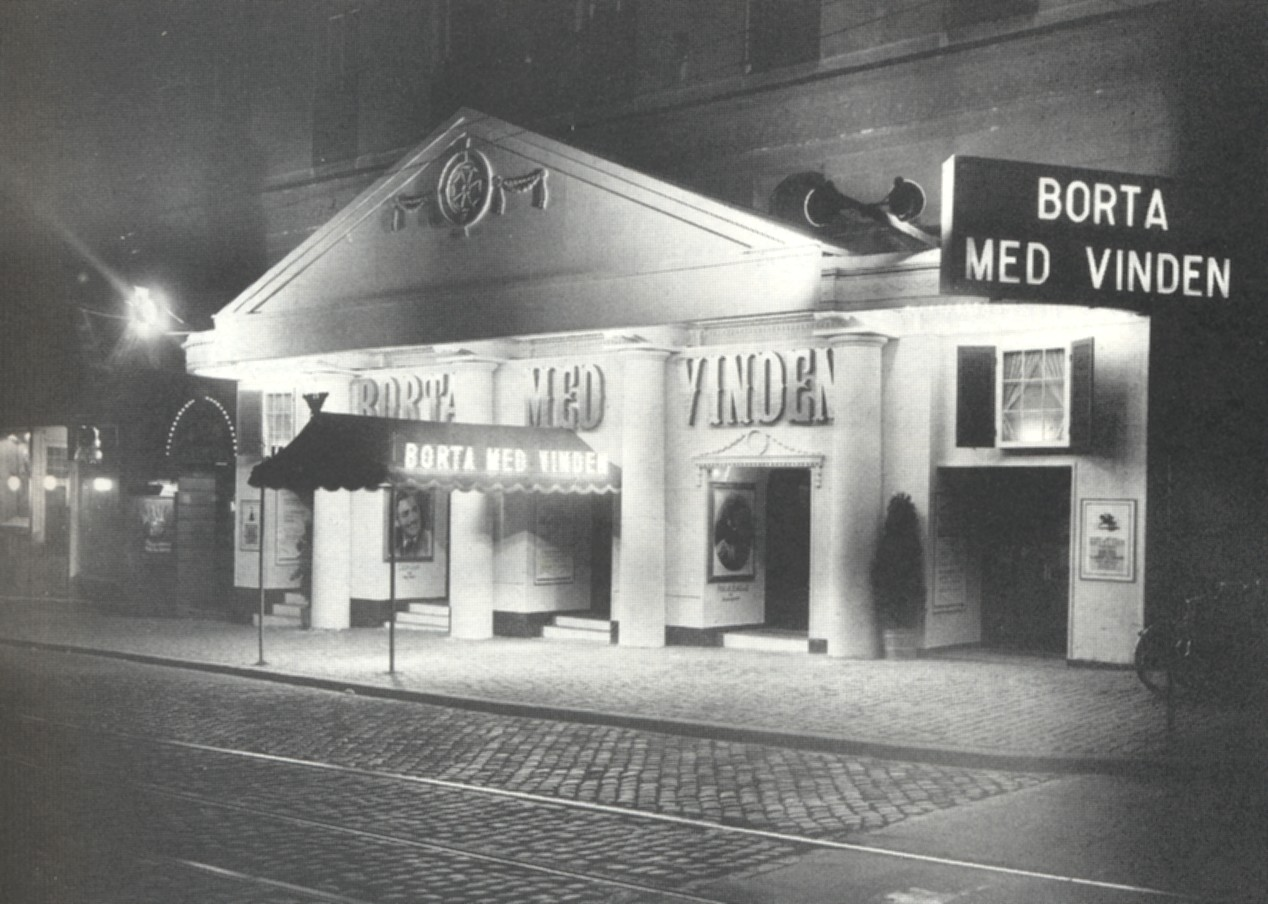 Stockholmsbiografen "Palladium" visar "Borta med vinden"